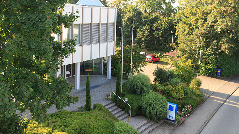 Unternehmenssitz in Überlingen